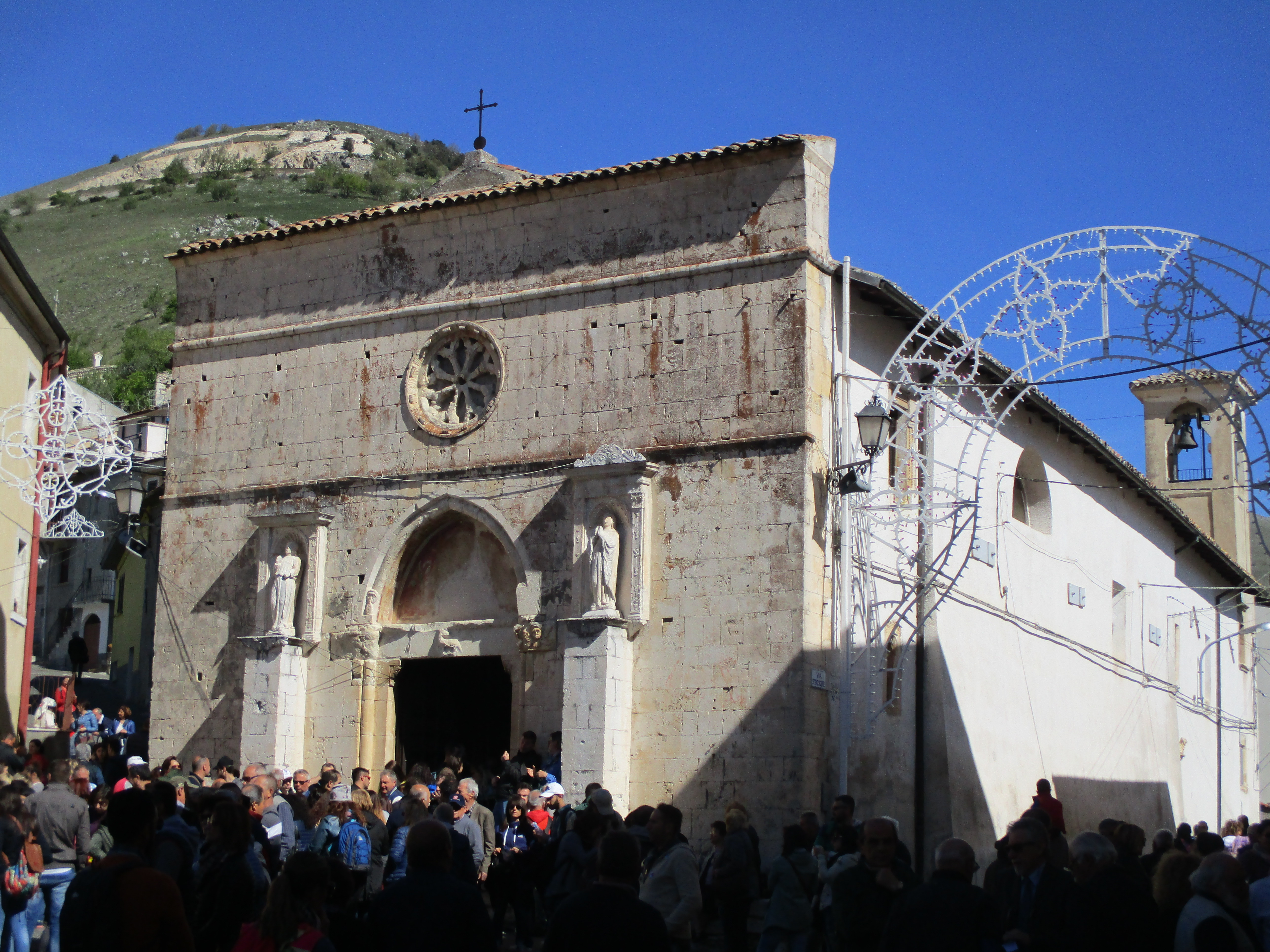 Santa Maria delle Grazie durante il rito dei Serpari